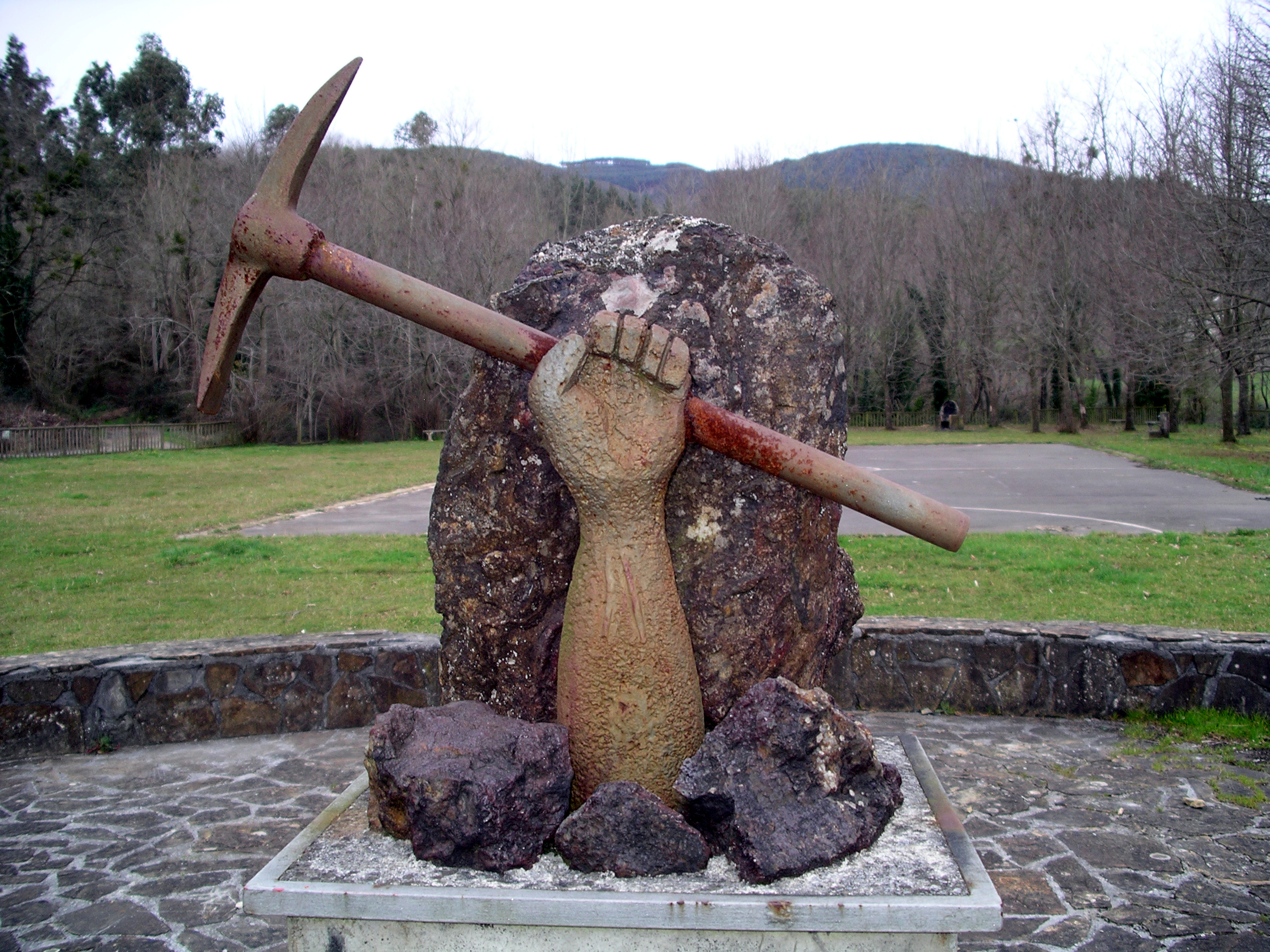 Meatzari jendearen omenezko Alen Elkartearen eskultura, "Meatzari jendearentzako", Garape/Sopuerta, Enkarterri (Bizkaia).